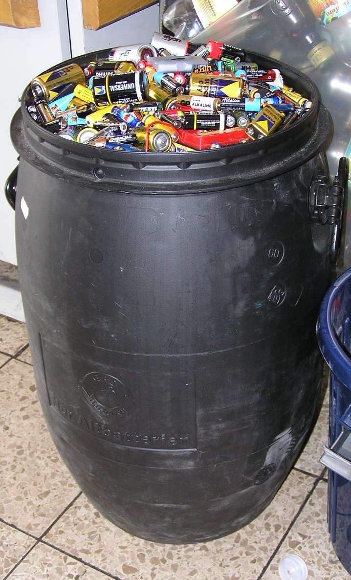 Tonne zum Batterierecycling in einem Supermarkt